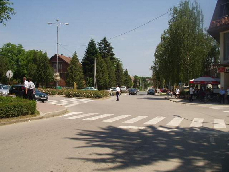 Dubrava - Centar po ljeti